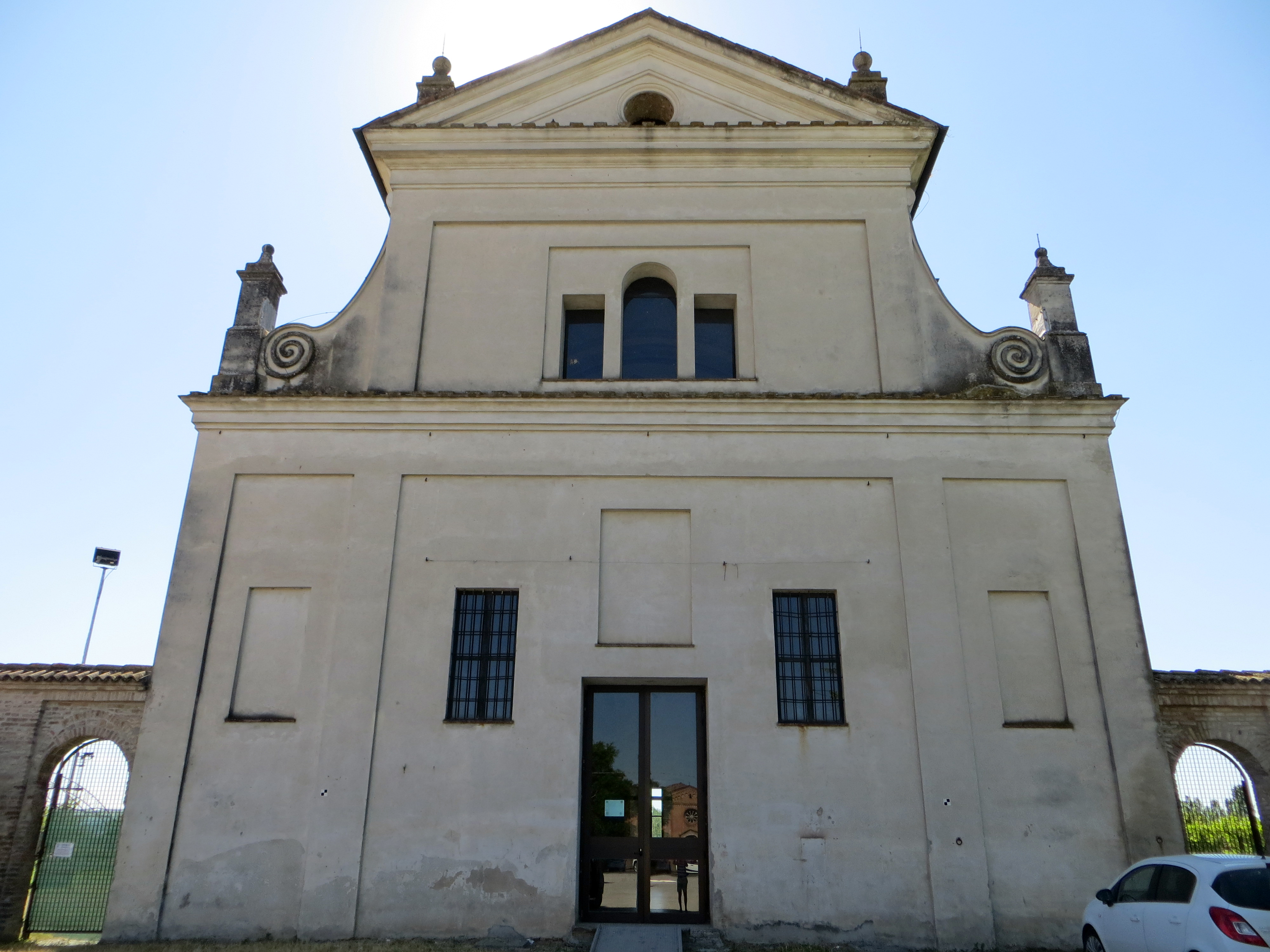 Chiesa dei Cappuccini (Fontevivo) - facciata